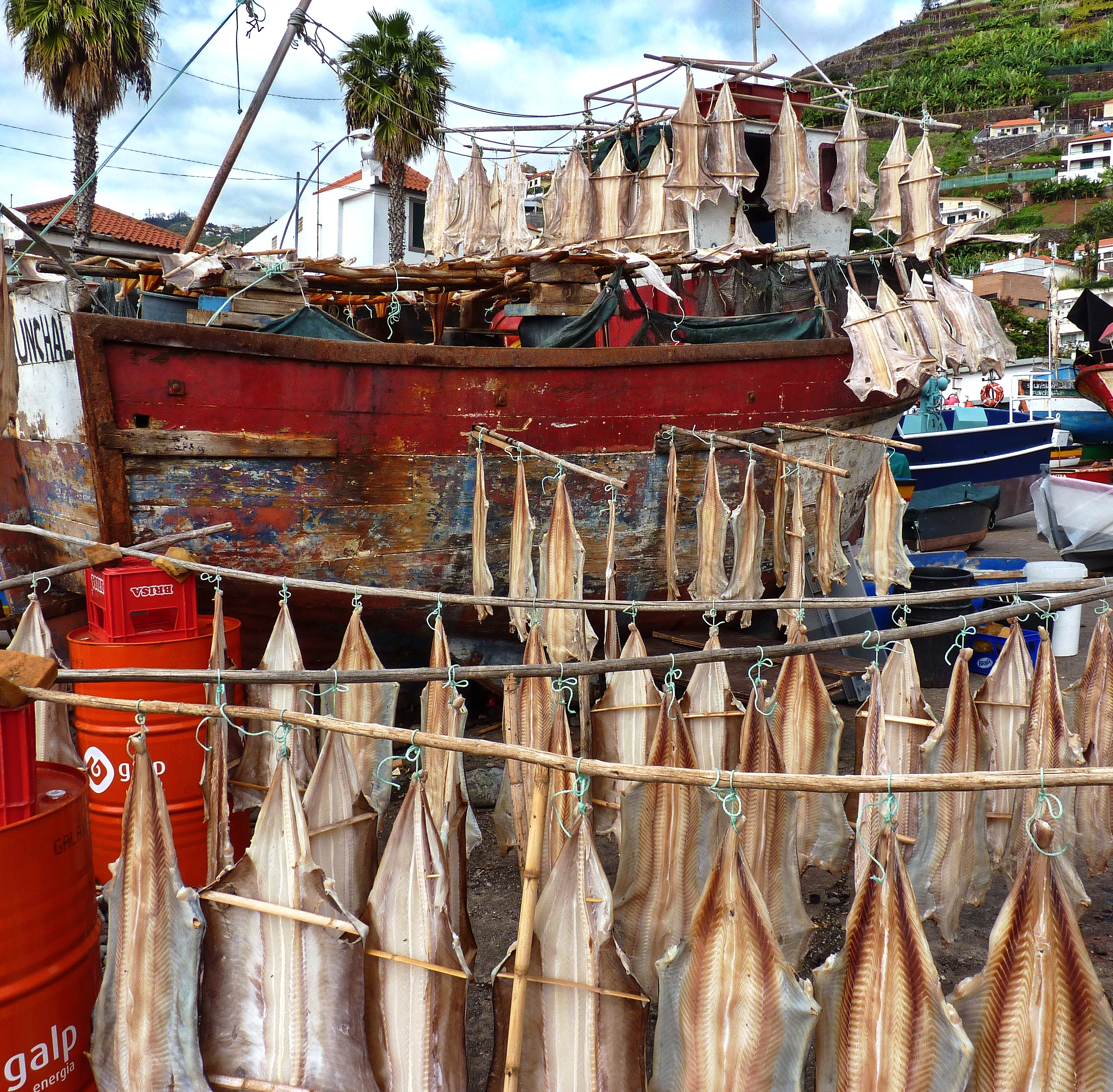 Câmara De Lobos - essicazione del pesce sciabola